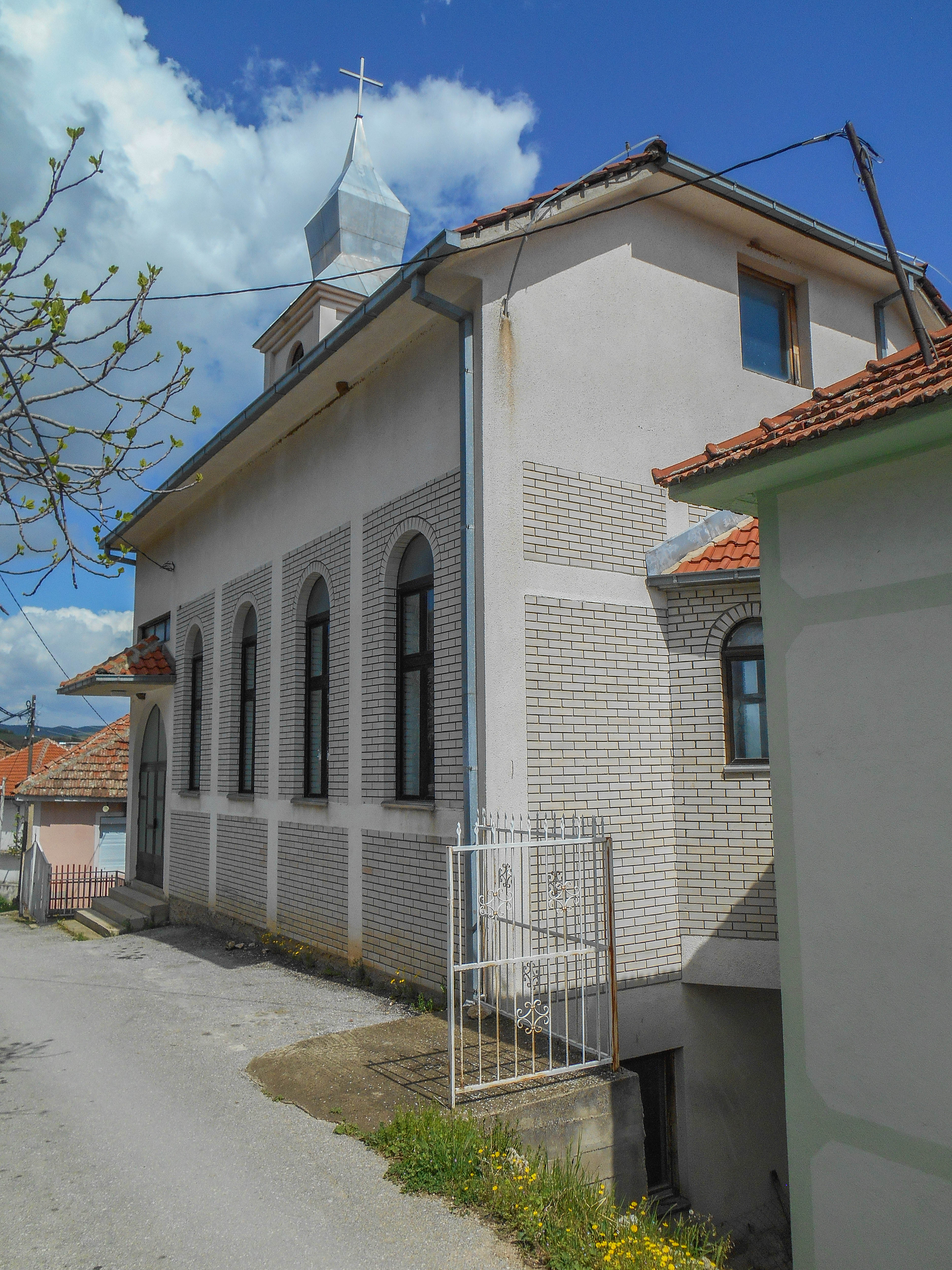 Евангелско-методистичка црква